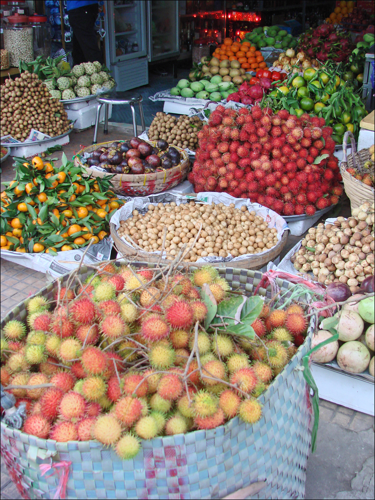 Can Tho est située au bord du Bassac (en vietnamien Hậu Giang, ou deuxième fleuve) qui est un bras (ou défluent) du Mékong. C'est une agglomération de 160.000 habitants, qui concentre les très importantes productions agricoles de la région : fruits, légumes, riz, etc.. Les marchés flottants autour de Can Tho sont célèbres. Dans une région souvent inondée, le transport fluvial reste en effet privilégié par rapport au transport routier.